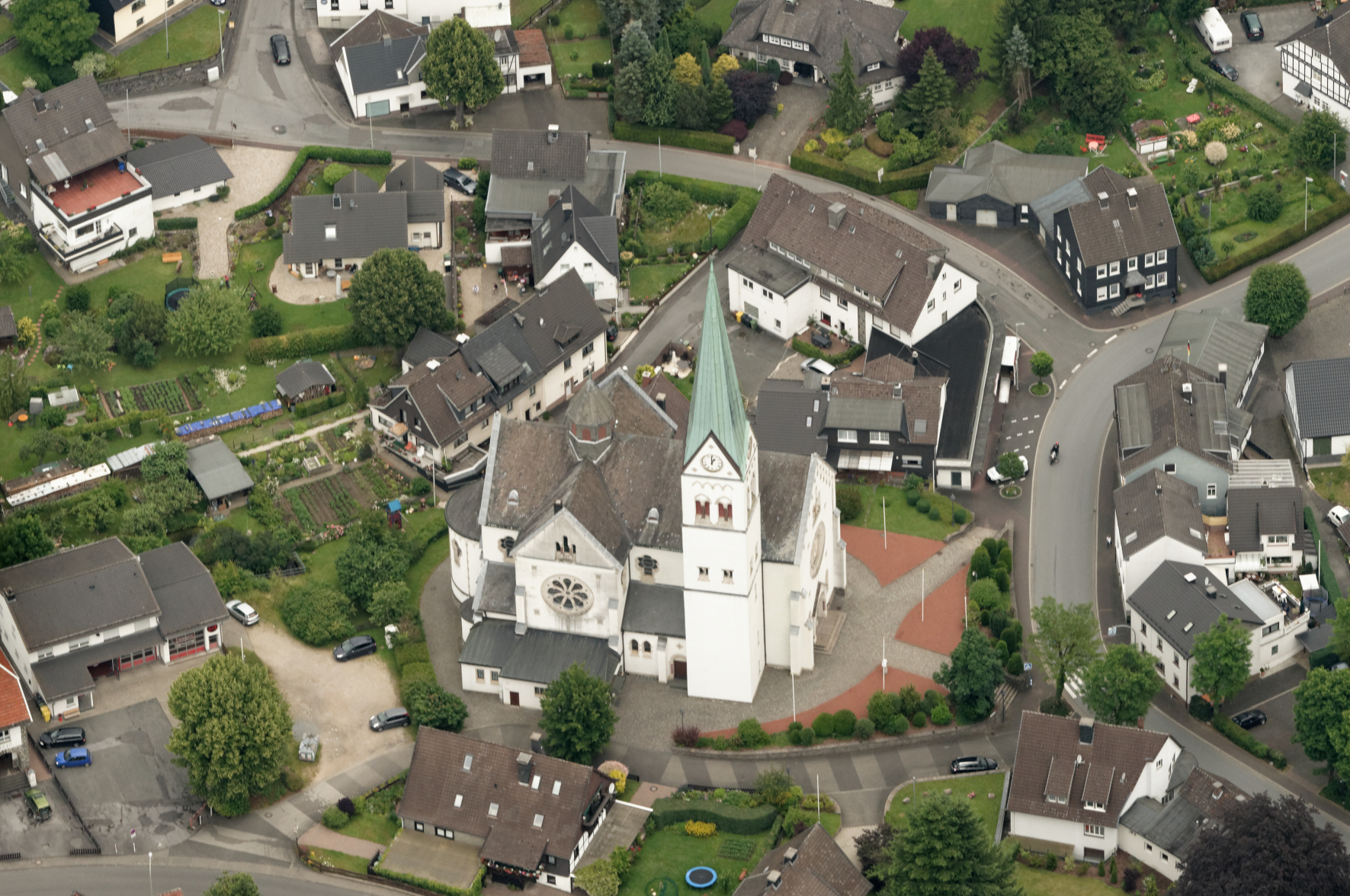 Fotoflug Sauerland Nord. Finnentrop, Teilansicht Heggen mit Pfarrkirche St. Antonius Einsiedler The making of this document was supported by the Community-Budget of Wikimedia Germany.